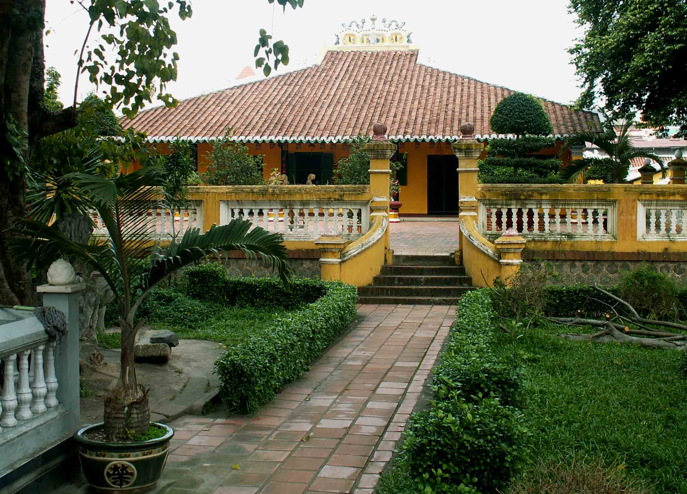 Chùa Giác Lâm, thành phố Hồ Chí Minh. Hình này do Phan Ba tự chụp vào tháng 12 năm 2005 và đưa vào phạm vi công cộng.